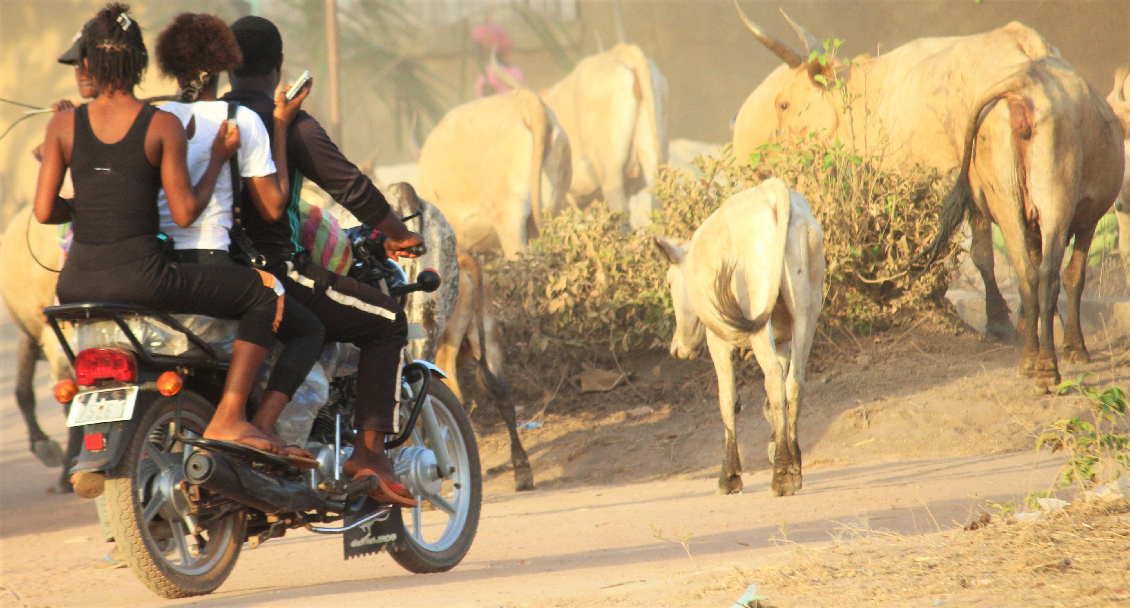 Kamsar This is an image with the theme "Africa on the Move or Transport" from: Guinea